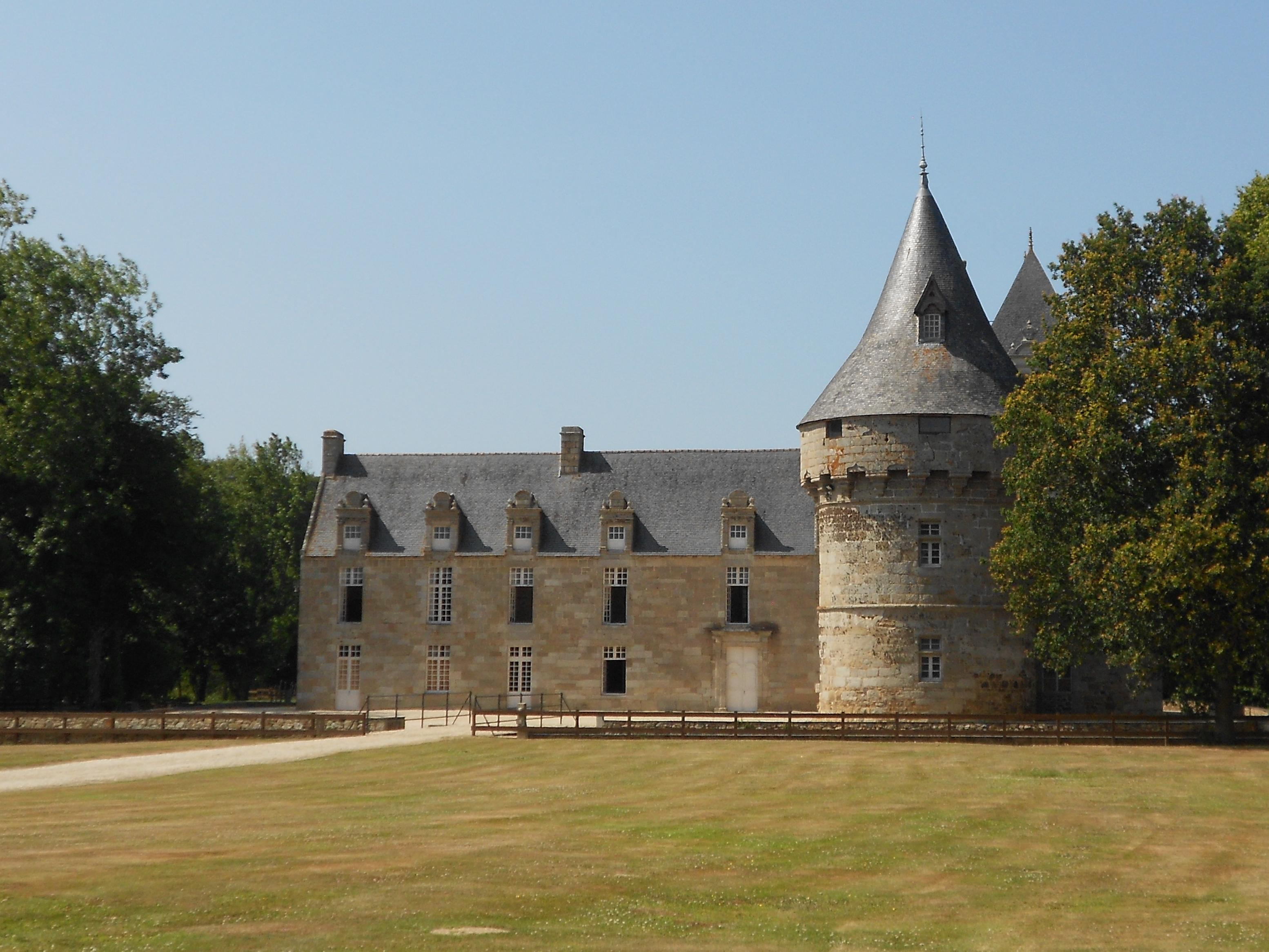 Château du 16ème 17ème siècle.